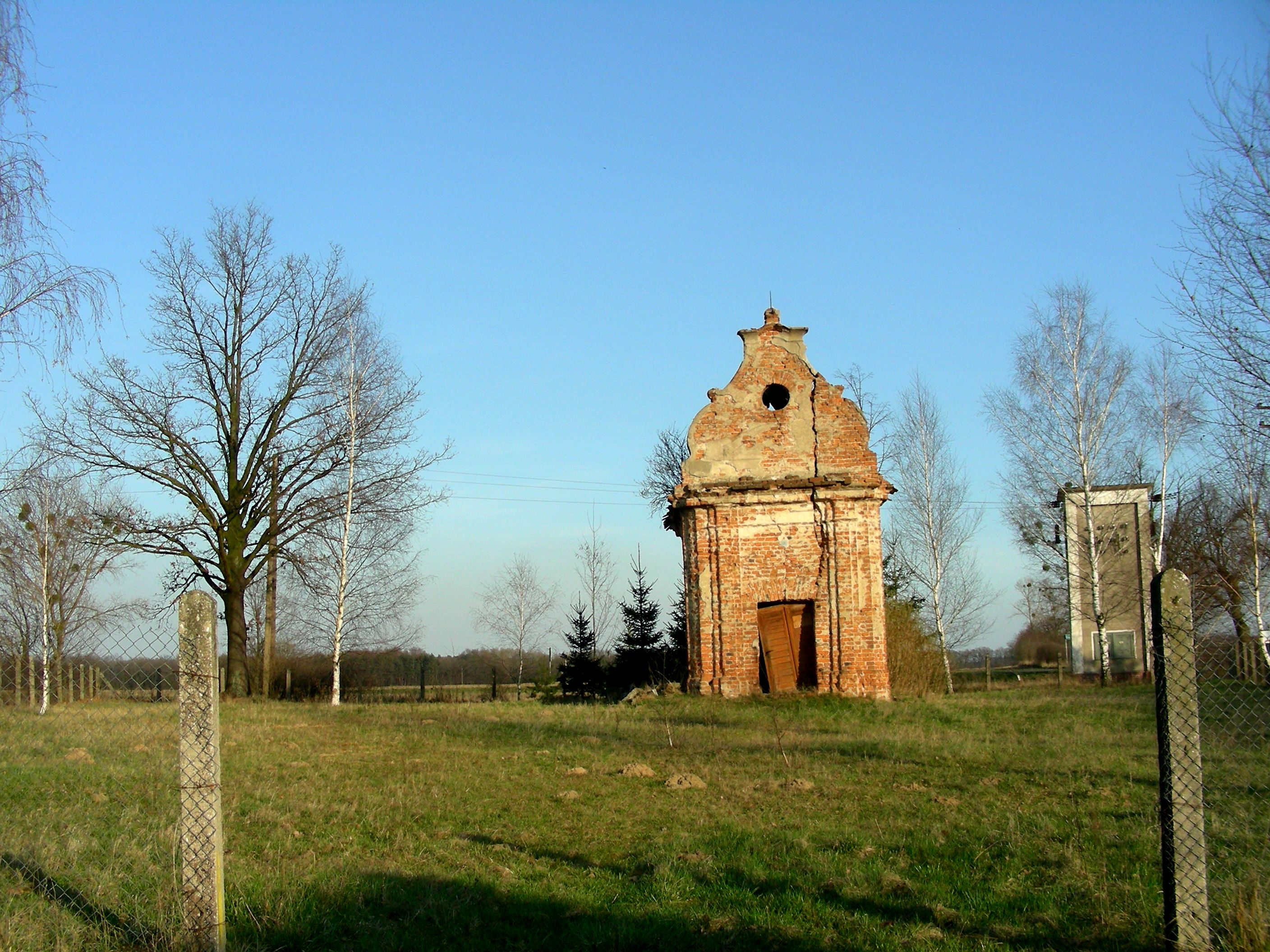 Kaplica i stary cmentarz w Mikolinie, wieś Mikolin, gmina Skorogoszcz, powiat brzeski, województwo opolskie